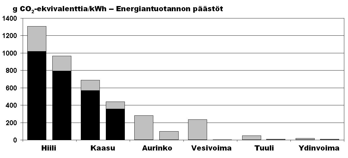 Vertailu eri energialähteiden tyypillisistä kasvihuonekaasujen maksimi- ja mininimipäästöistä. Varsinaisen energiatuotannon päästöt merkitty mustalla, muun elinkaaren (polttoaineenhankinnat, rakentaminen, huolto ym.) päästöt harmaalla Kuva tehty itse perustuen tietoihin artikkelista Spadaro, J. et al.: Greenhouse Gas Emissions of Electricity Generating Chains, IAEA Bulletin Vol.42, Wien, 2000, ISSN 0020-6067